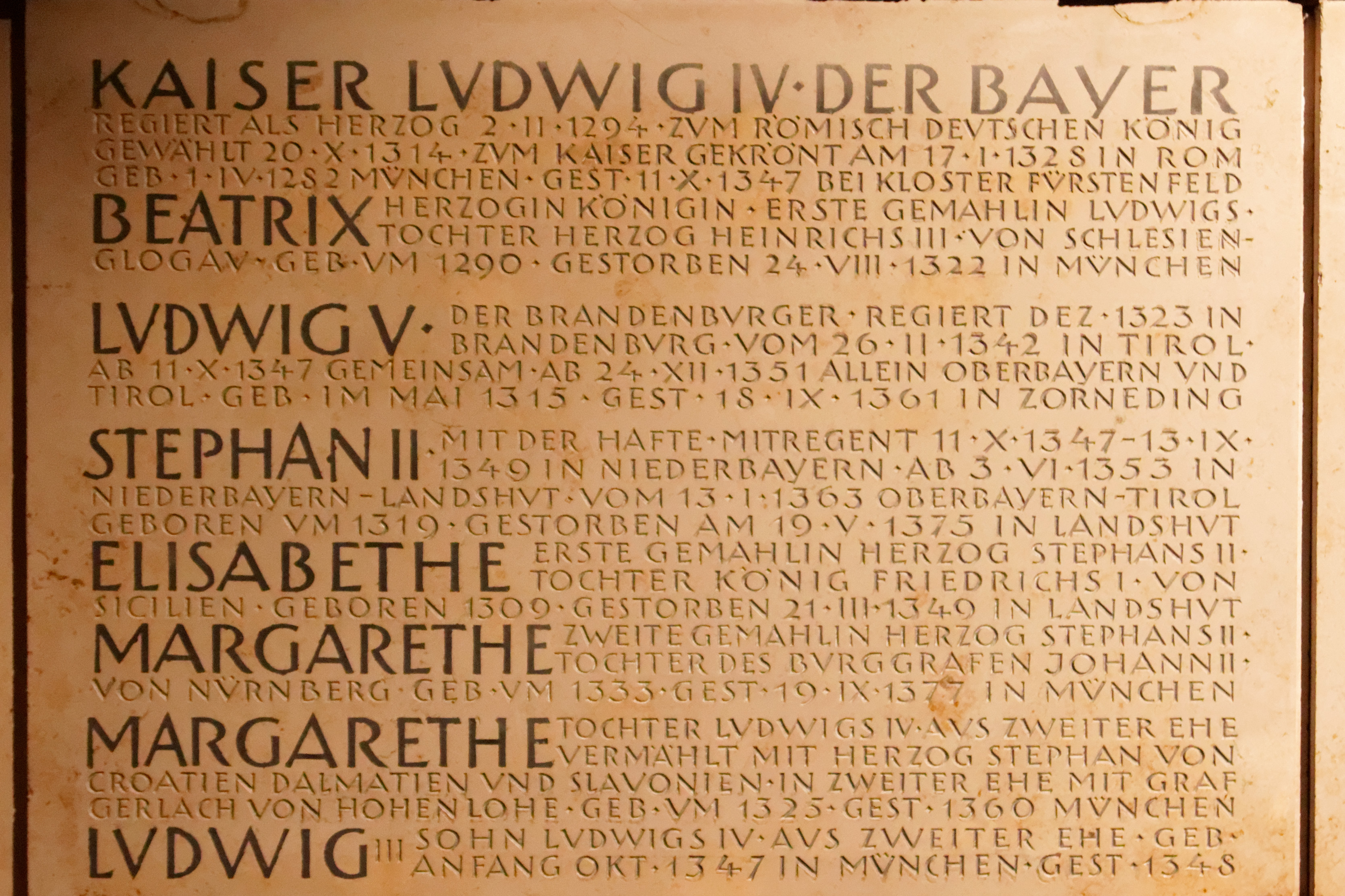 Gedenktafel an die in der Frauenkirche beigesetzten Wittelsbacher in der Krypta der Frauenkirche